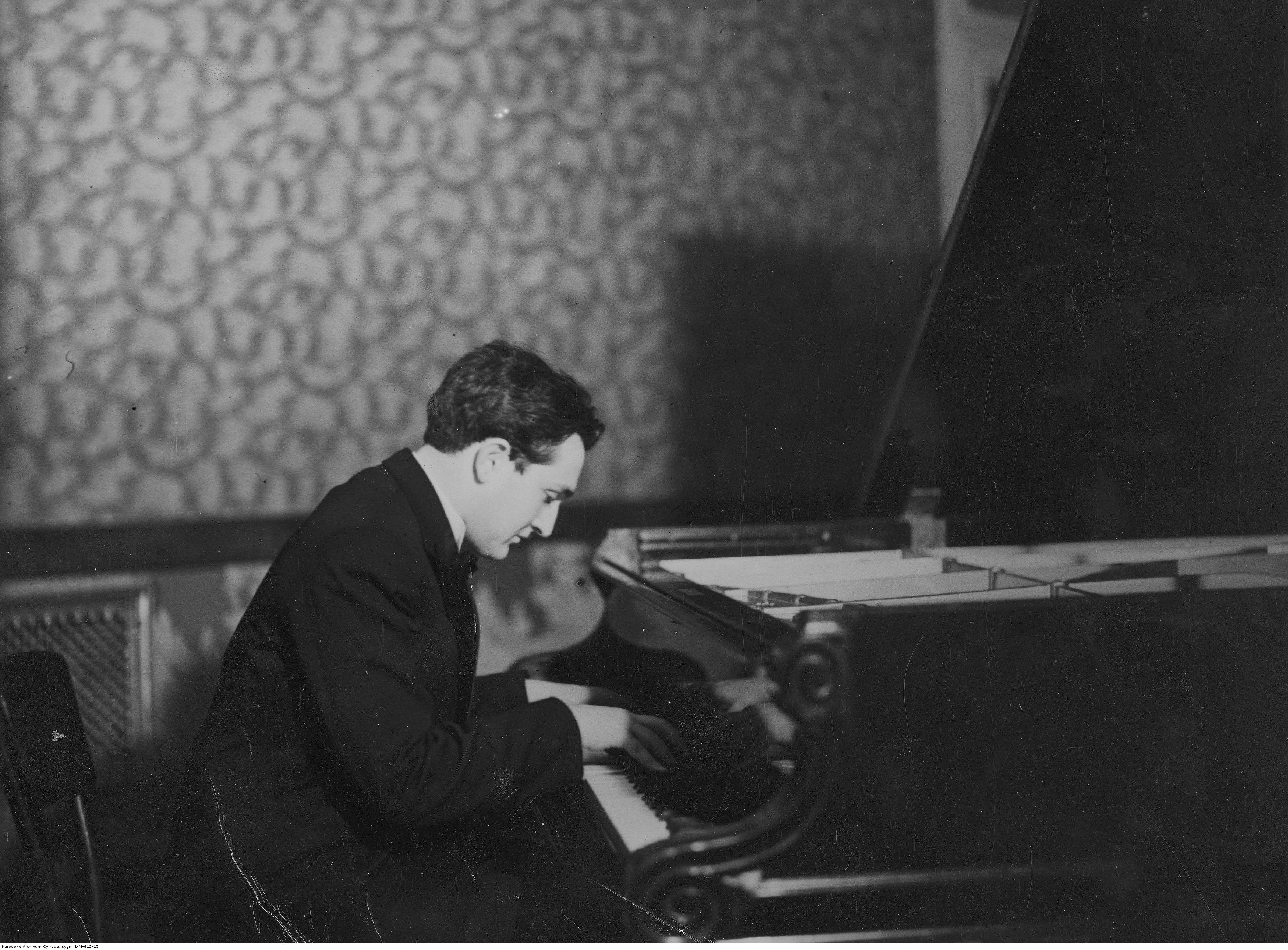 3rden:Jakov Zak during 3rd Chopin Competition